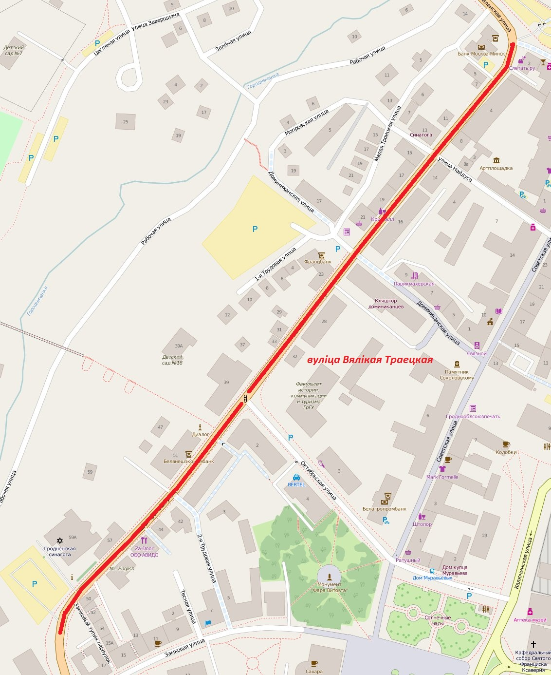 Вуліца Вялікая Траецкая на мапе Гродна. Файл зроблены на падставе OpenStreetMap. licence - Creative Commons Attribution-ShareAlike 2.0 Крыніца